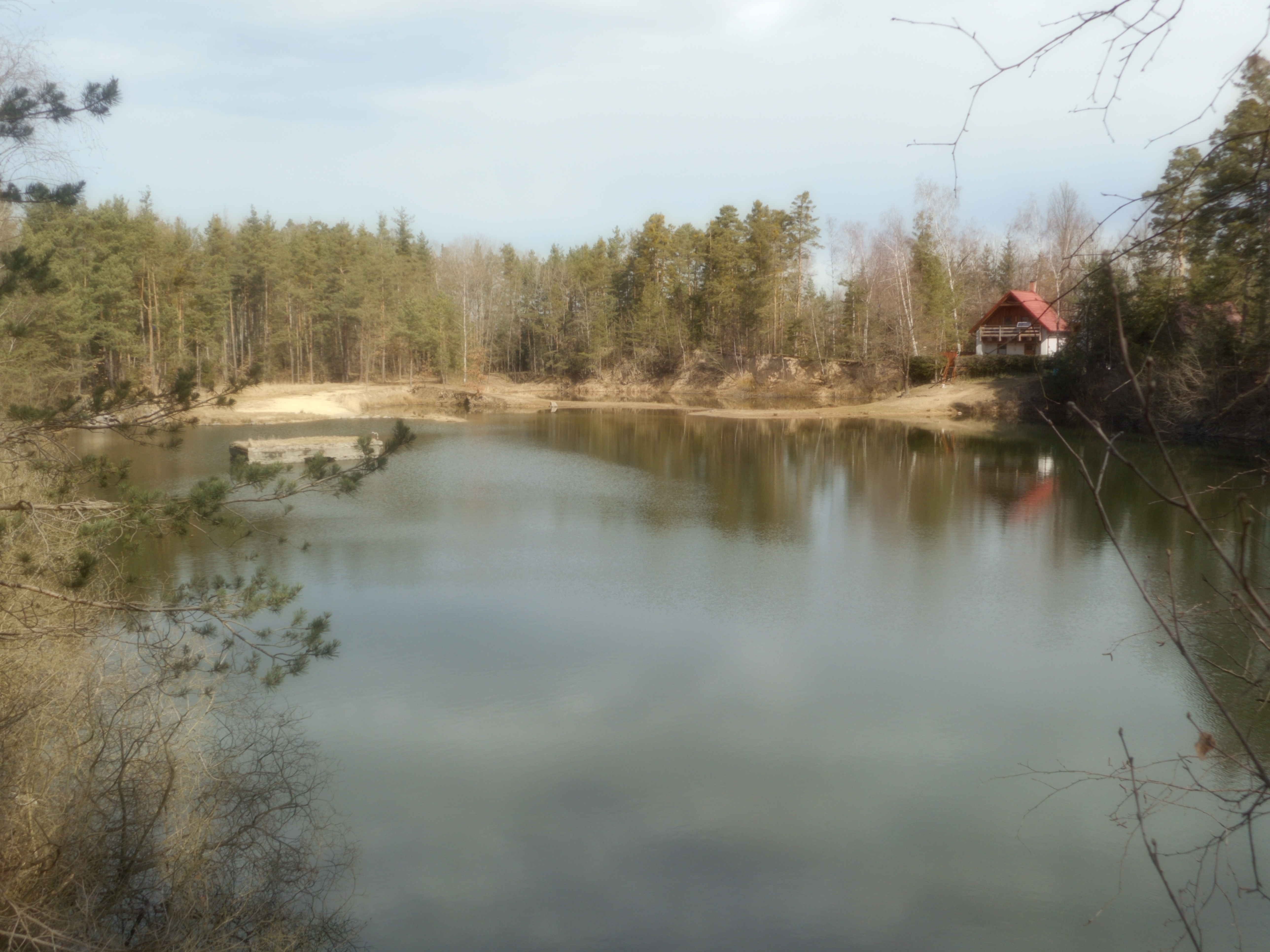 Dunajovická hora - lom s jezírkem